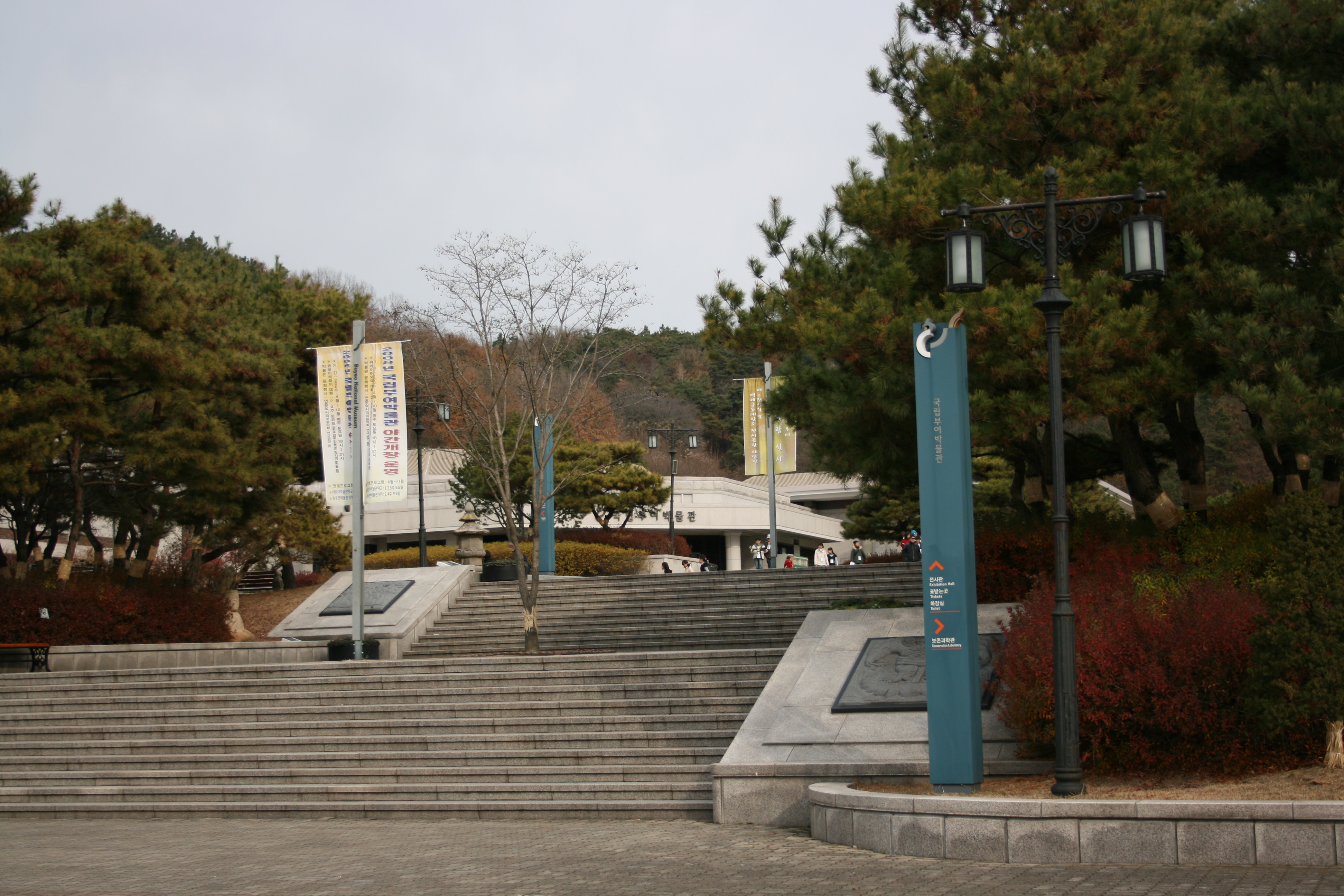 국립부여박물관 전경